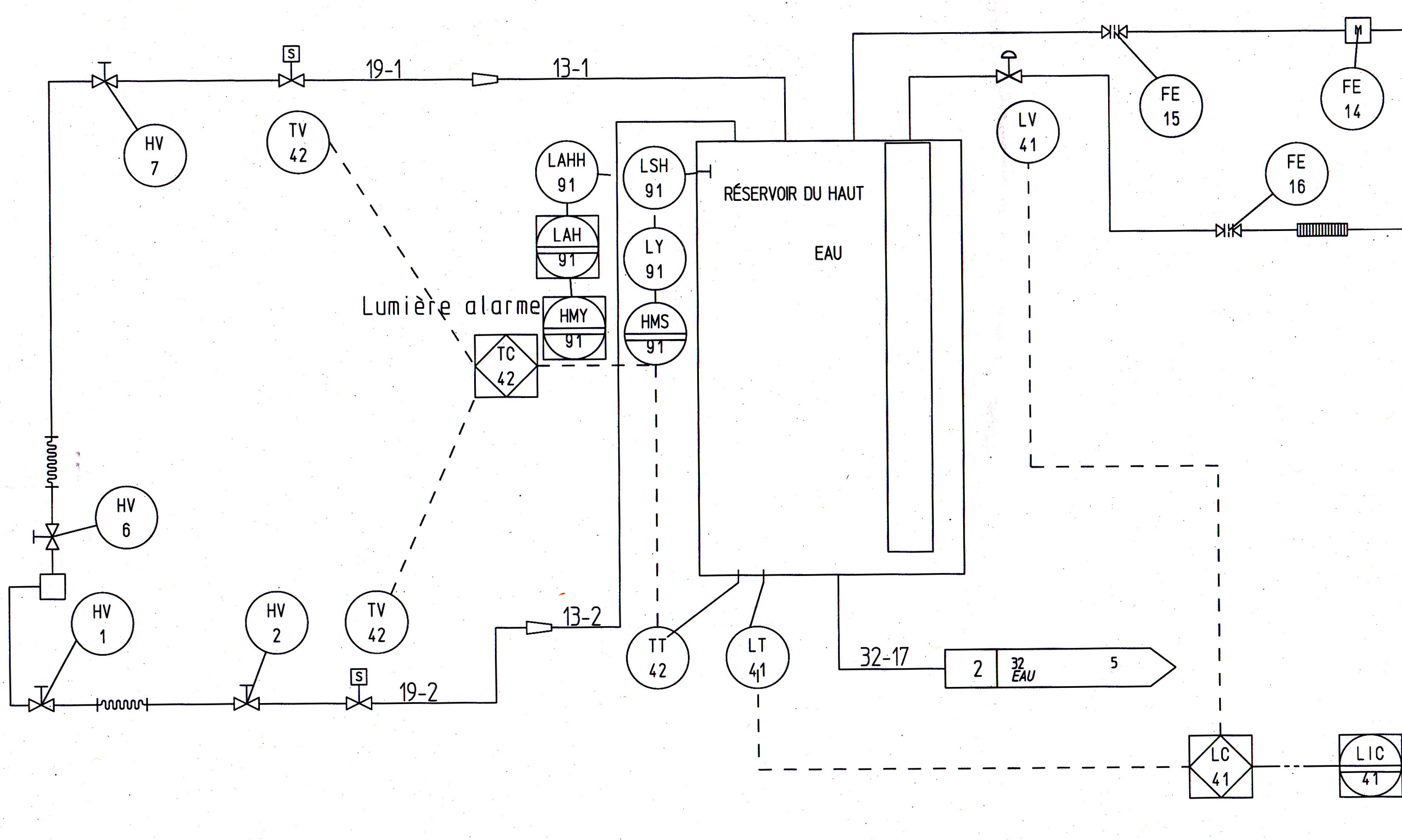 Schéma de tuyauterie et instrumentation conforme au norme ISA S5.1. Unknown